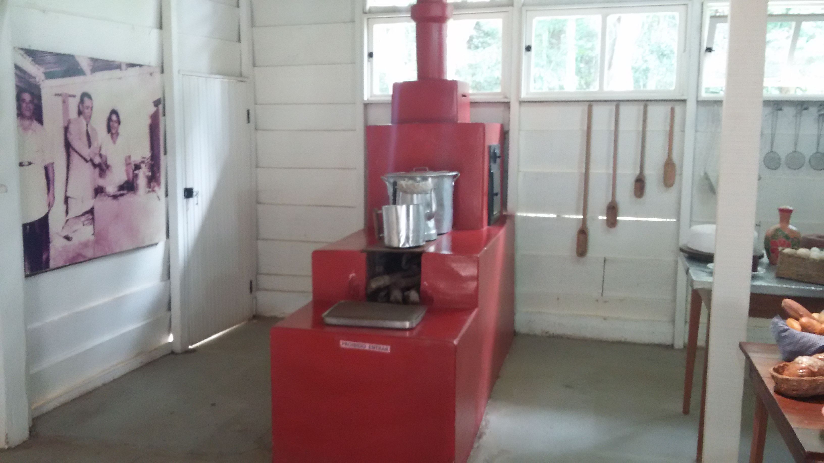 el horno fue utilizado por 2 años.